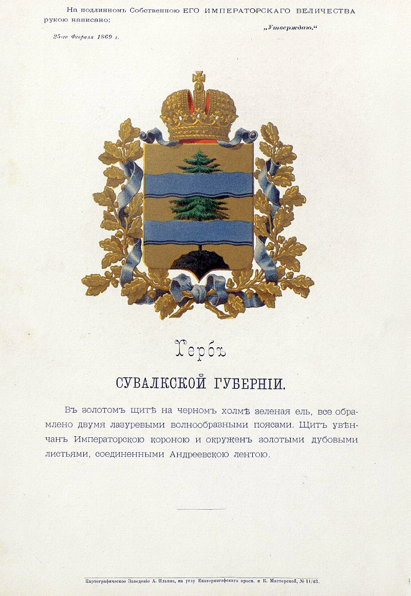 Official Russian Empire coat of arms Suvalki Governorate. Герб Российской Империи Сувалкской губернии с официальным описанием в Гербовнике Бенке. Утверждён Императором Всероссийским Александром Вторым.